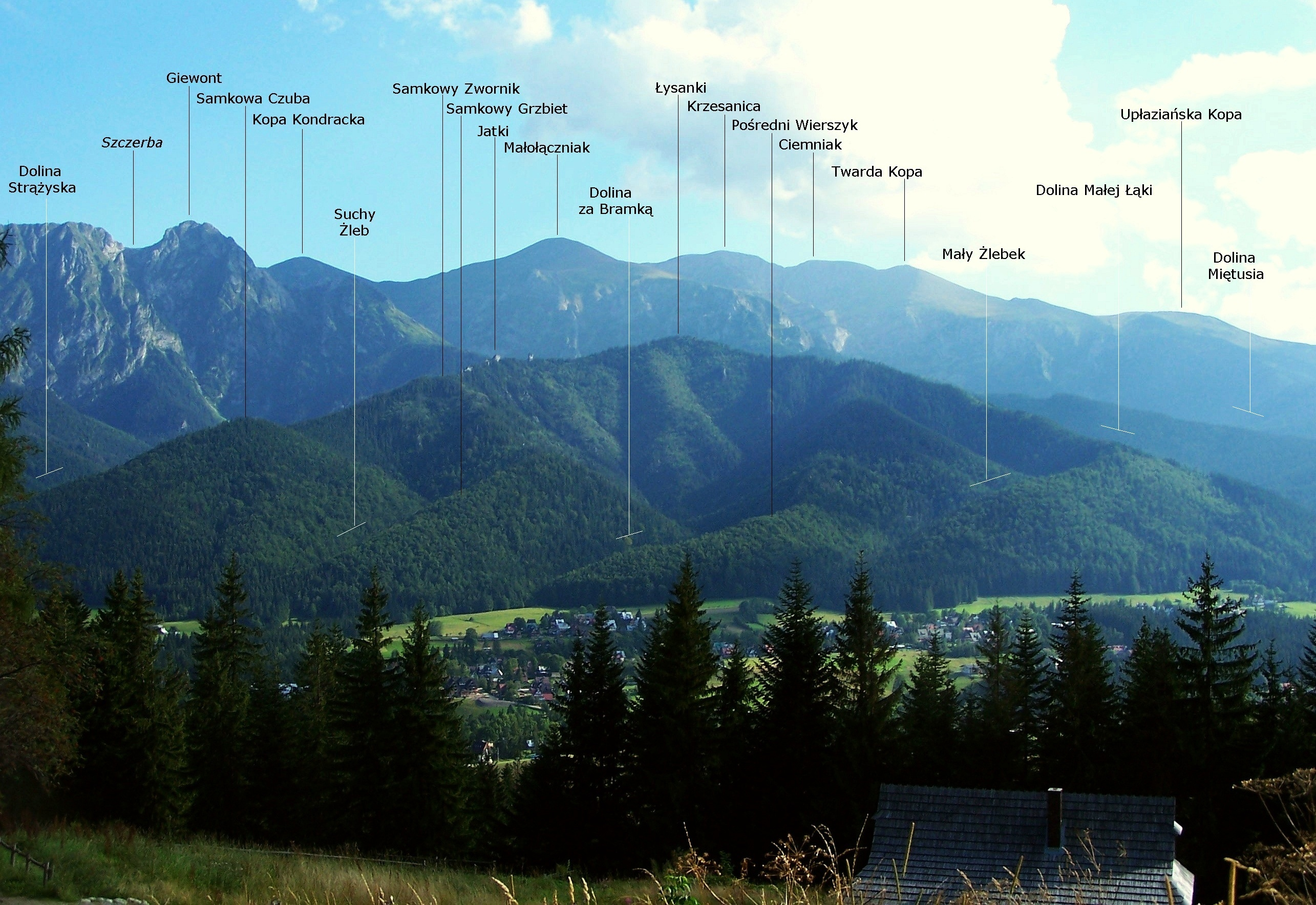 Opisany masyw Łysanek i panorama widokowa